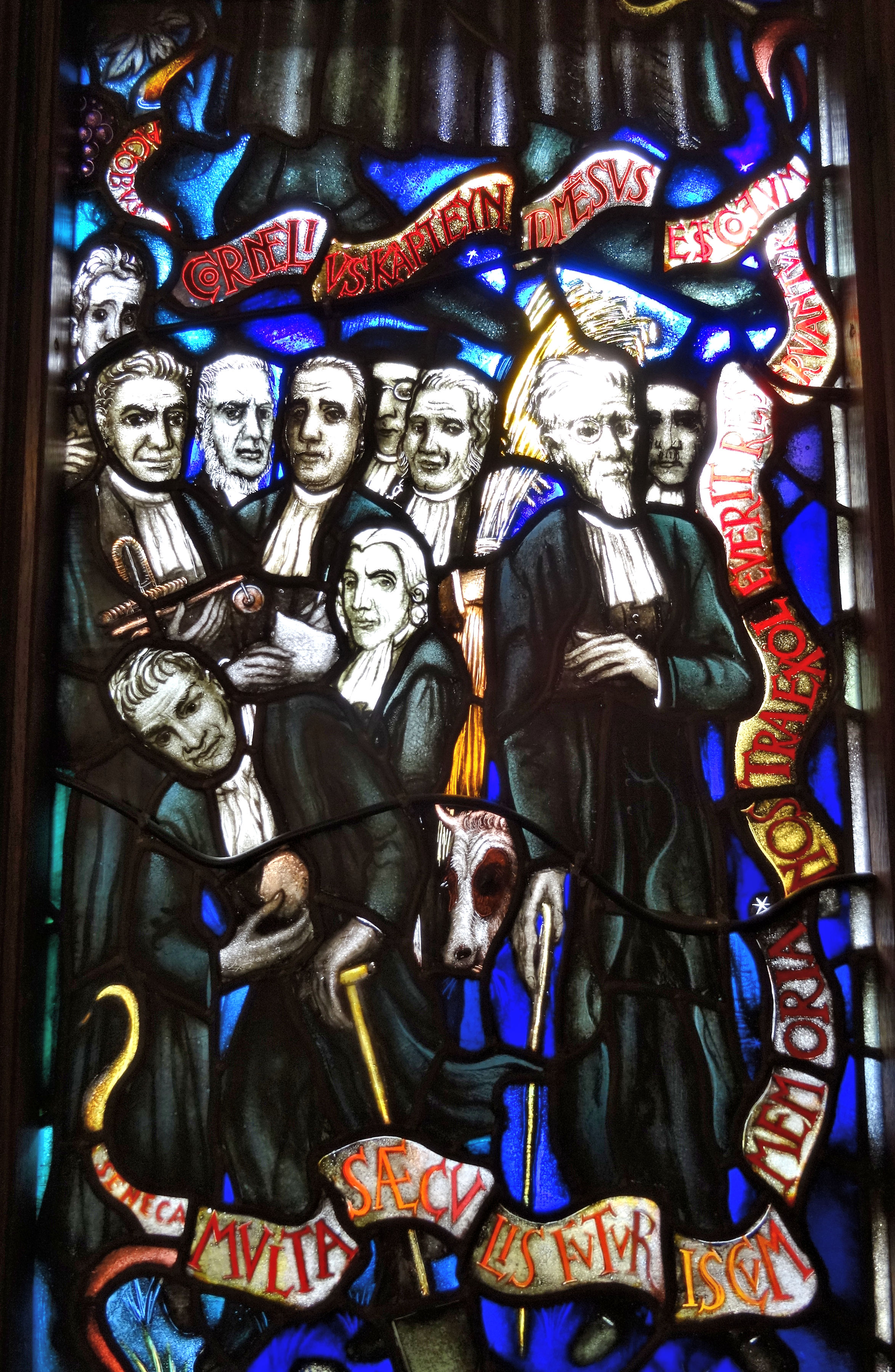 Detail raam V De moderne tijd. De vijf gedenkramen in de aula van het Academiegebouw in Groningen werden tussen 1937 en 1951 gemaakt door de kunstenaar Johan Dijkstra. In het paneel zijn onder anderen Barthold Henrik Lulofs, Jacob Baart de la Faille, Johan Huizinga, Theodorus van Swinderen, Gerard Heymans en Leo Polak afgebeeld.